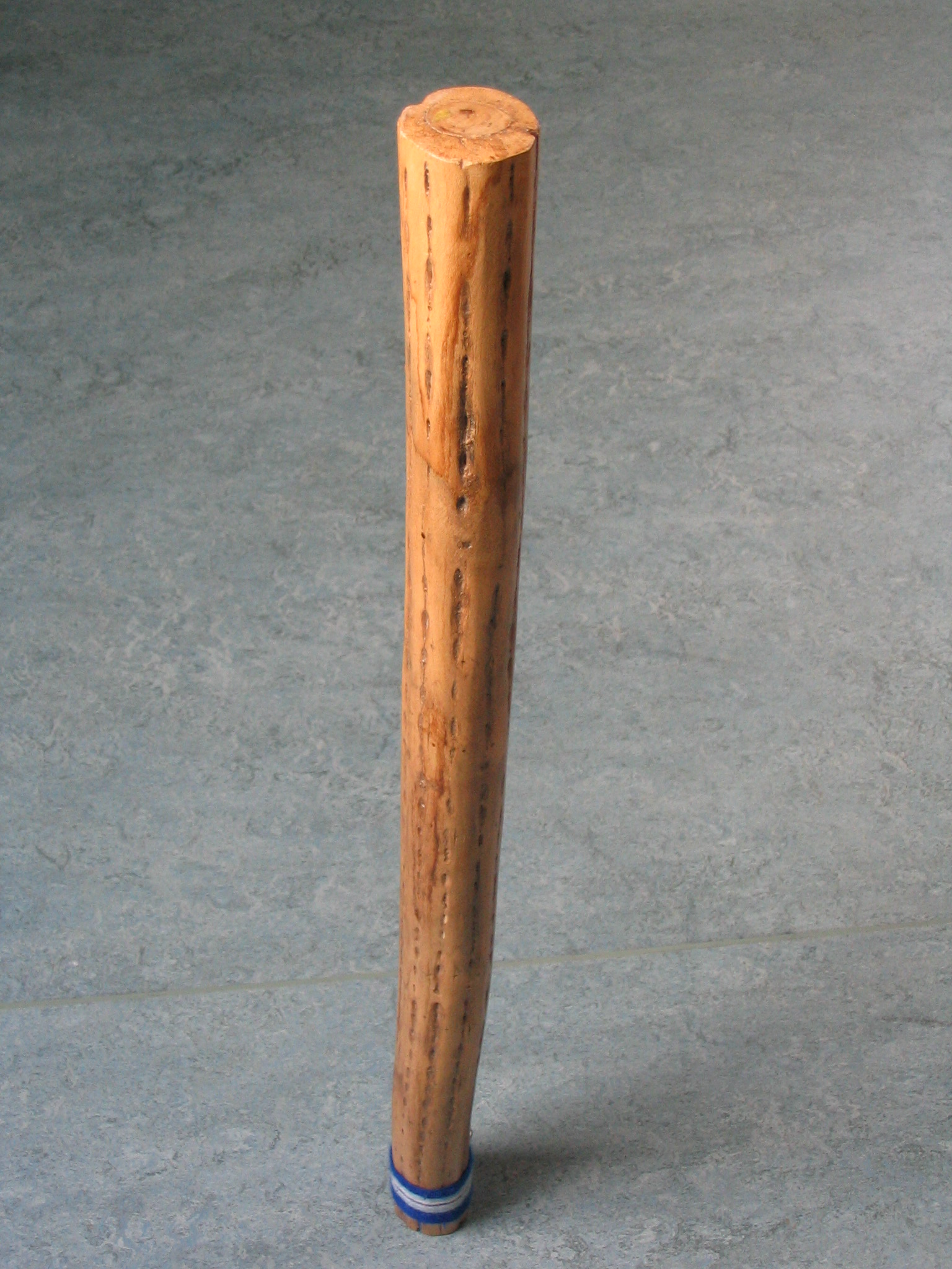 Das Bild zeigt einen Regenmacher, ein Effektinstrument